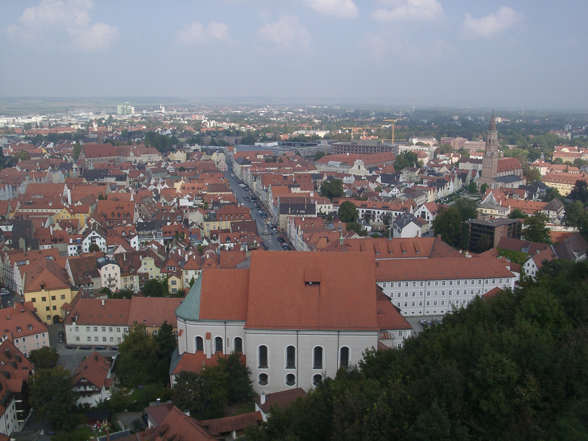 Landshut, Blick von Burg Trausnitz